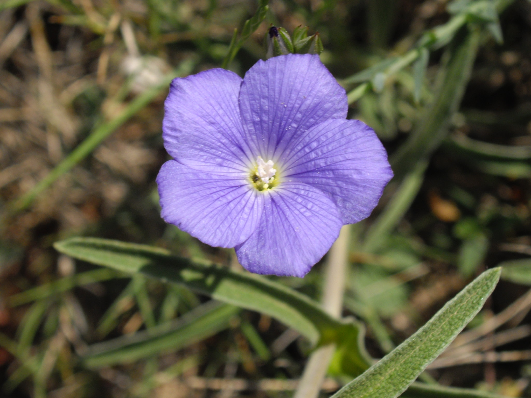 Linum narbonense